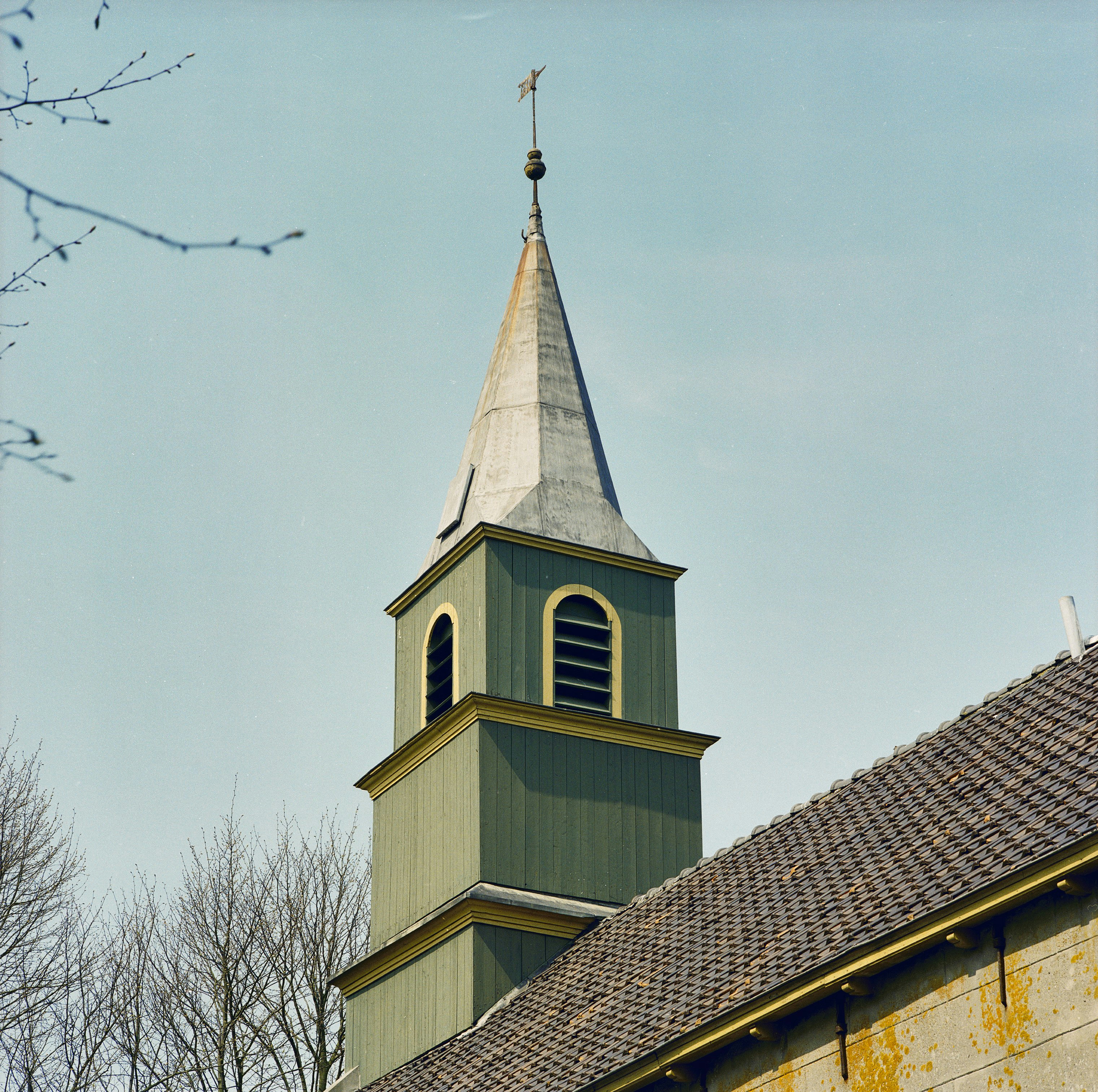 Nederlands Hervormde Kerk: Exterieur TOREN Z.W. ZIJDE